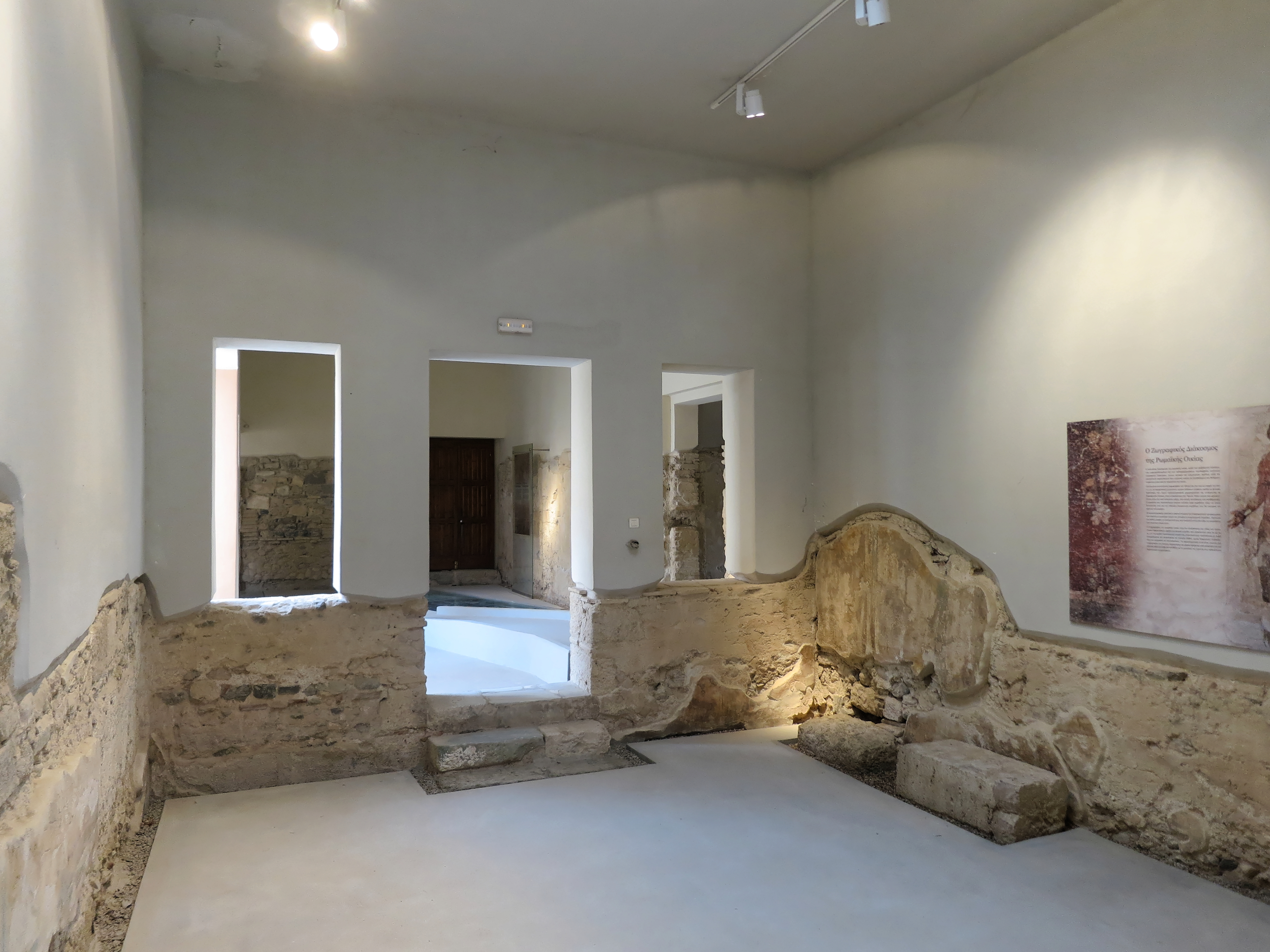 Die rekonstruierte römische Villa "Casa romana" in Kos (Stadt) auf der Insel Kos